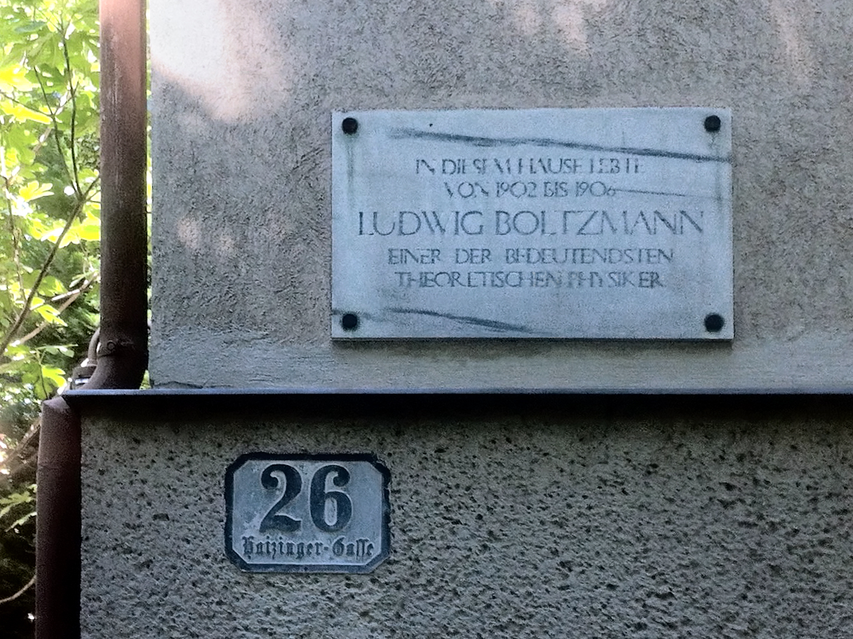 Gedenktafel für Ludwig Boltzmann an dessen letzter Wohnadresse in Wien-Währing